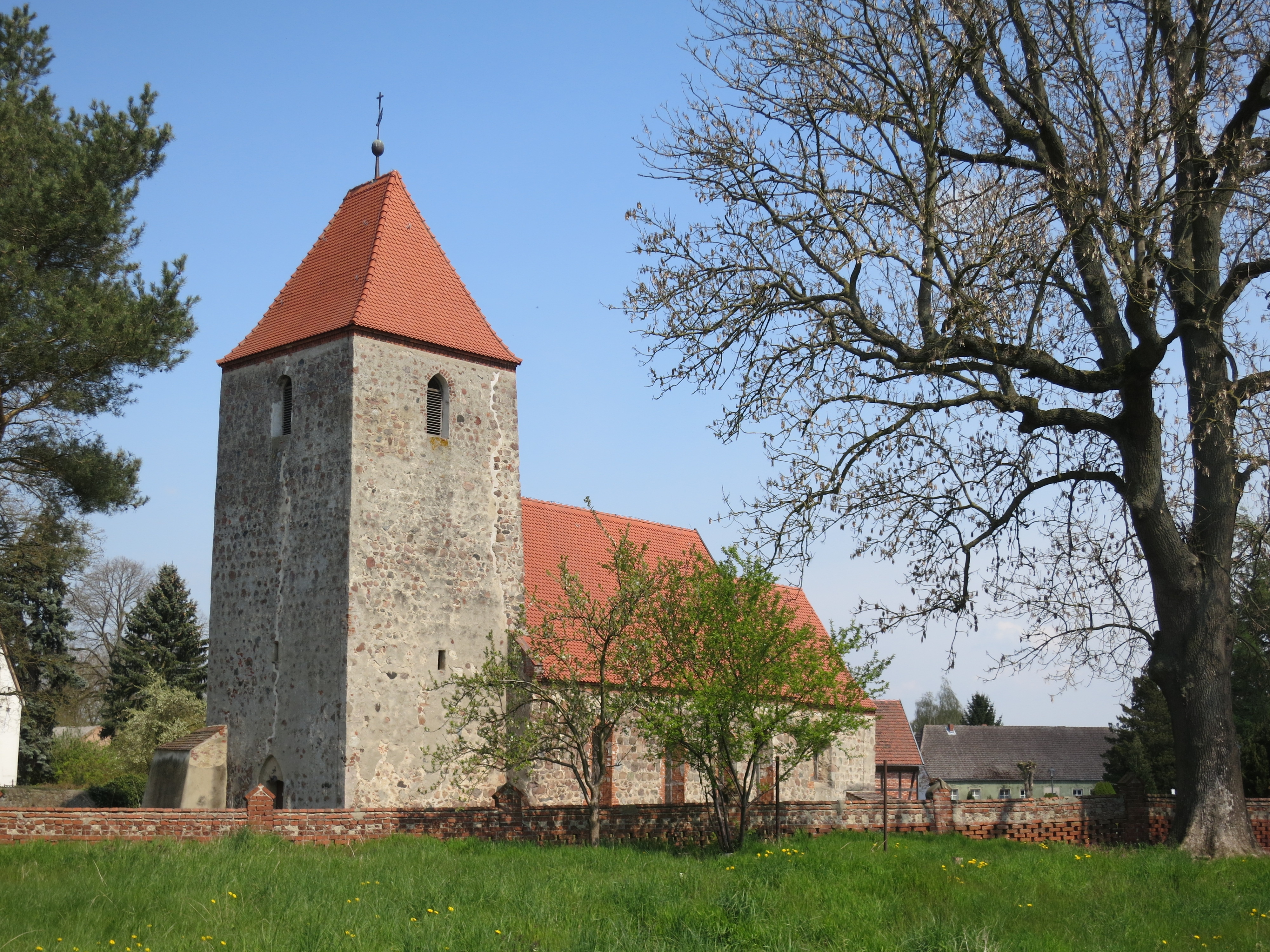 Boberow, Gemeinde Karstädt. denkmalgeschützte Dorfkirche von Südwesten